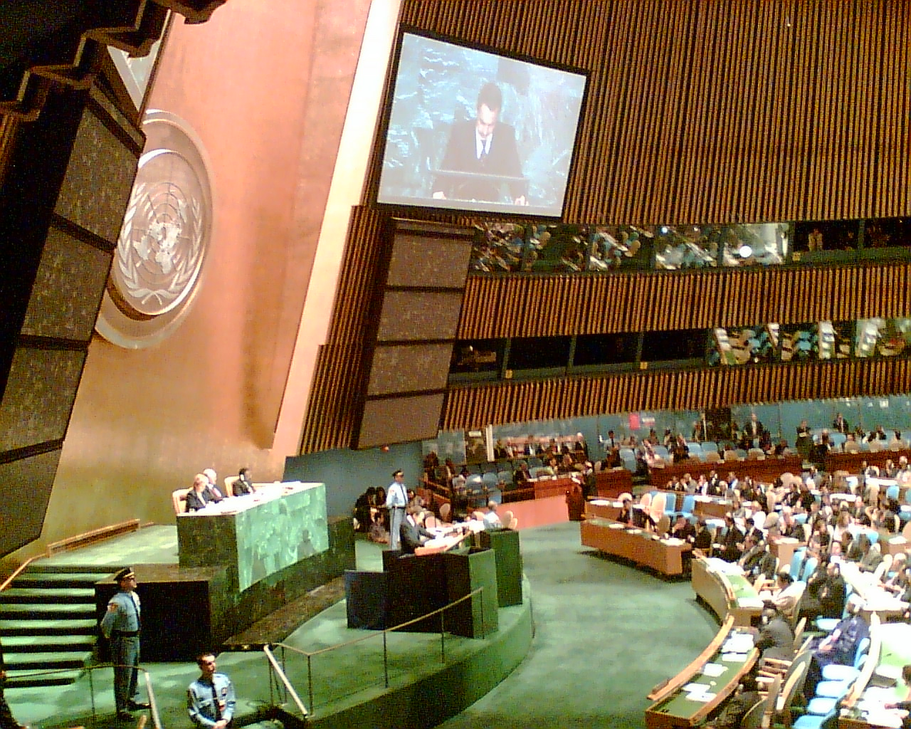 Discurso del Presidente Zapatero ante la Asamblea General.nokia035